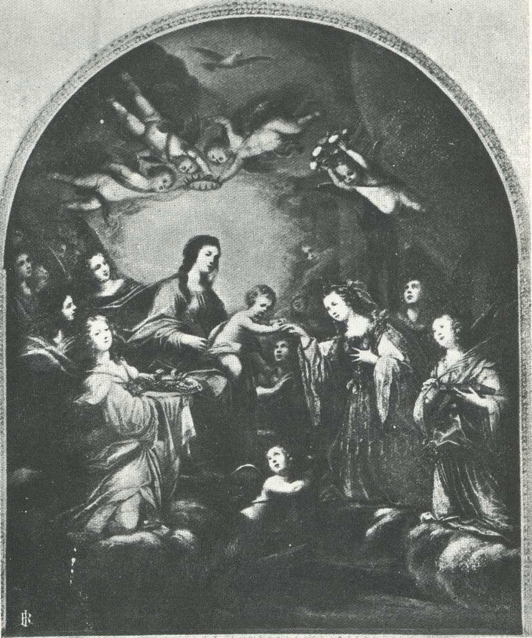 Sposalizio di S. Caterina proveniente dalla Chiesa di San Paolo a Messina.